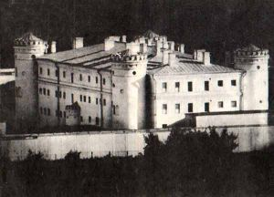 Piszczalauski_castle_(Miensk,_Bielarus), Пішчалаўскі замак у Менску